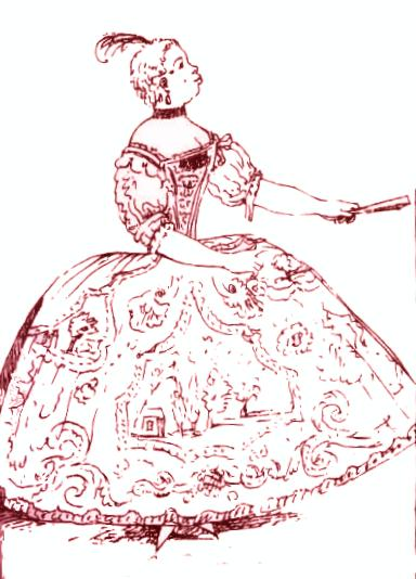 Caricature of Vittoria Tesi (1700-1775), opera singer